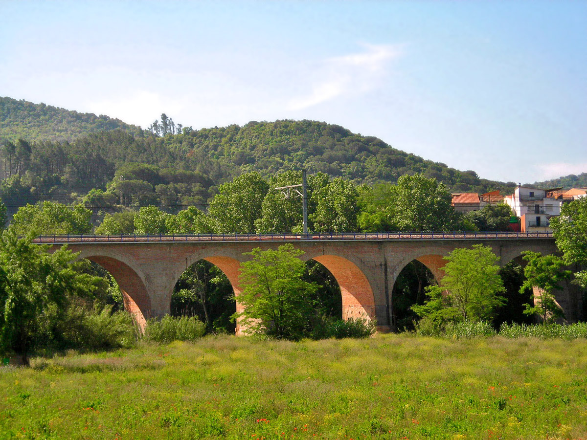 Pont del tren a la sortida de Sant Celoni direcció Barcelona